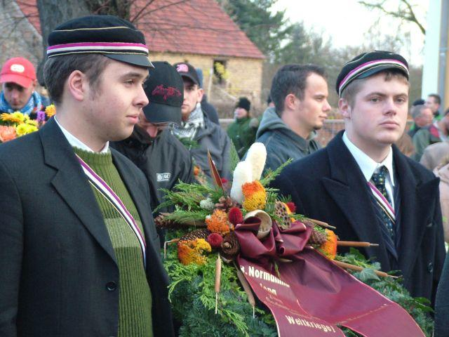 Bild zeigt zwei Mitglieder der Buschenschaft Normannia in Halbe auf einer Demonstration mit der Parole "Ruhm und Ehre dem deutschen Frontsoldaten" am 13.November 2004 in Halbe bei Berlin. Zum Persönlichkeitsrecht Siehe Bild Diskussion:Normannia Jena in Halbe.jpg